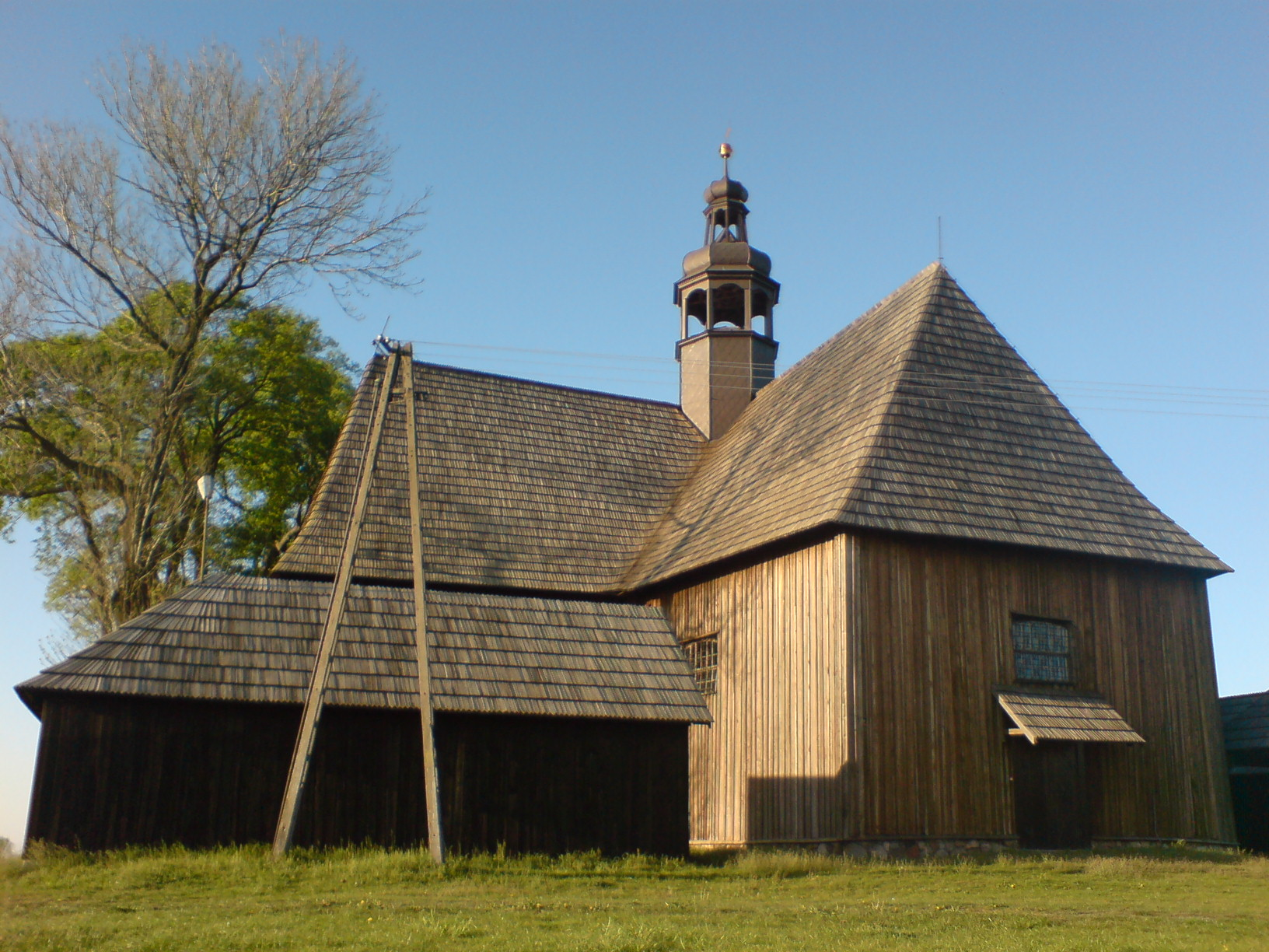 Drewniany kościół odpustowy pw. Narodzenia NMP „Na Pólku” z 1711 r. (okolice Bralina)